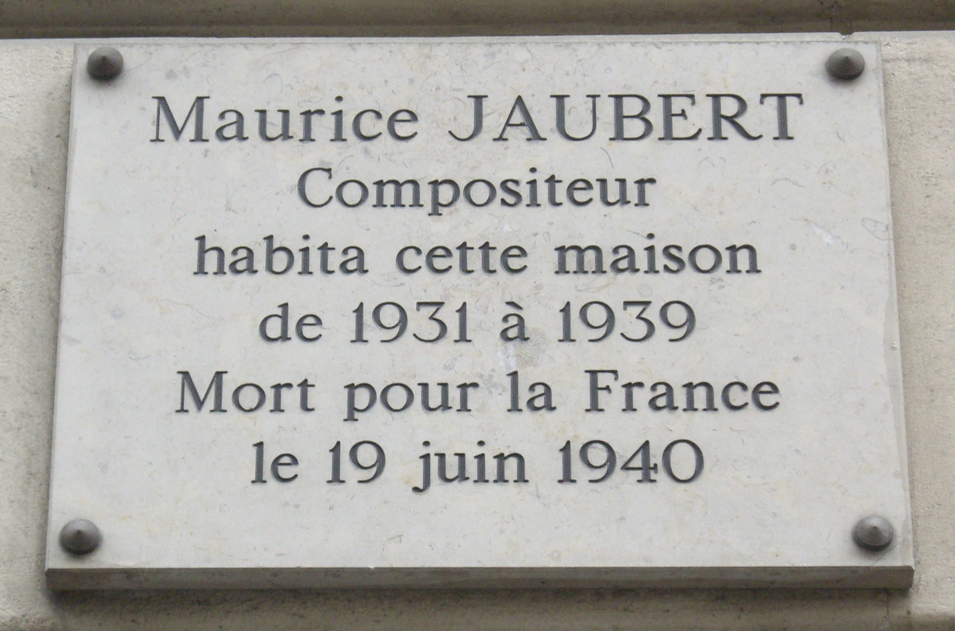 Plaque apposée au n° 98 de la rue du Cherche-Midi, Paris 6e, où vécut le compositeur Maurice Jaubert (1900-1940) de 1931 à 1939.